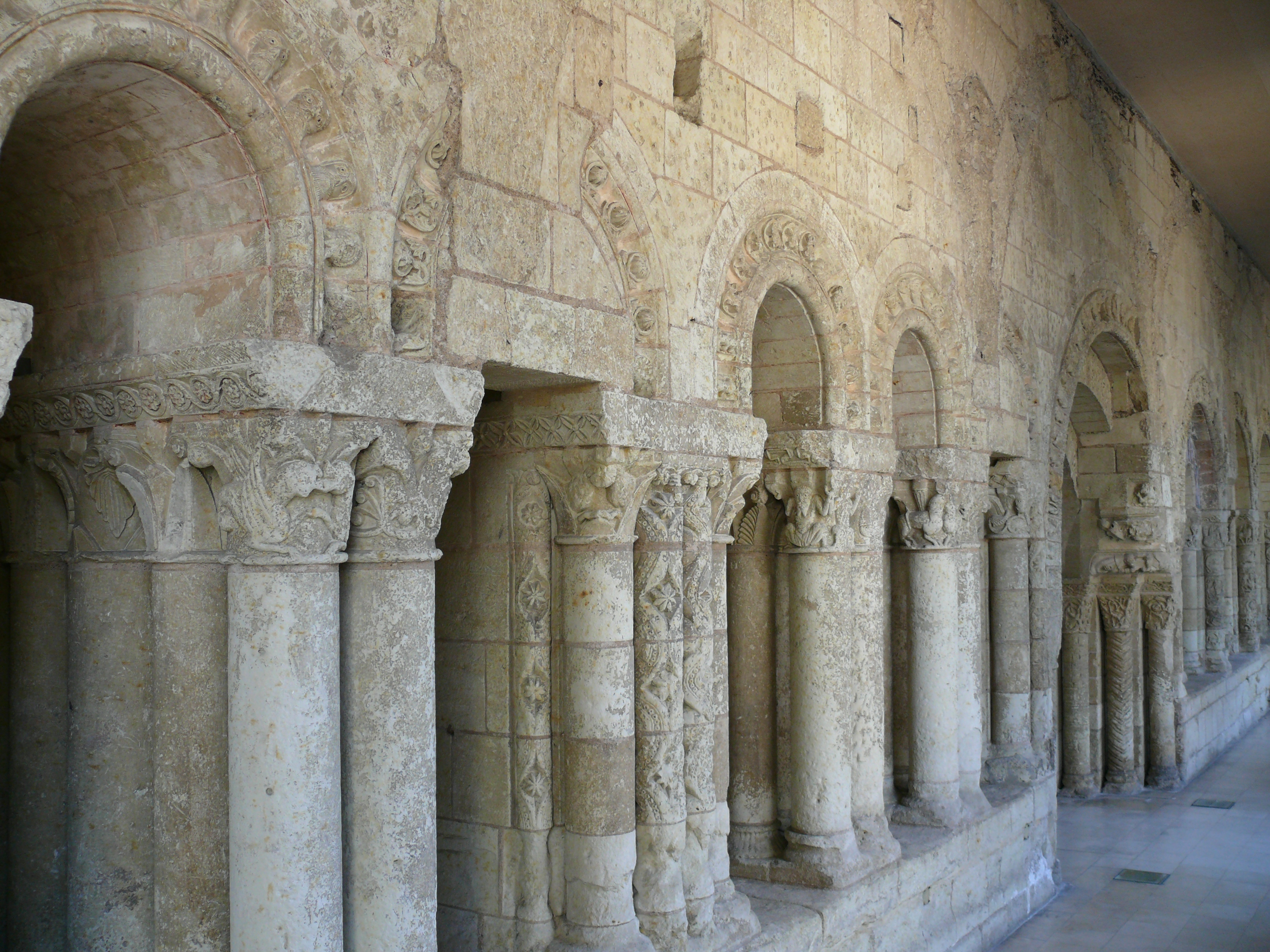 Angers - Préfecture - Cloître de l'abbaye Saint-Aubin